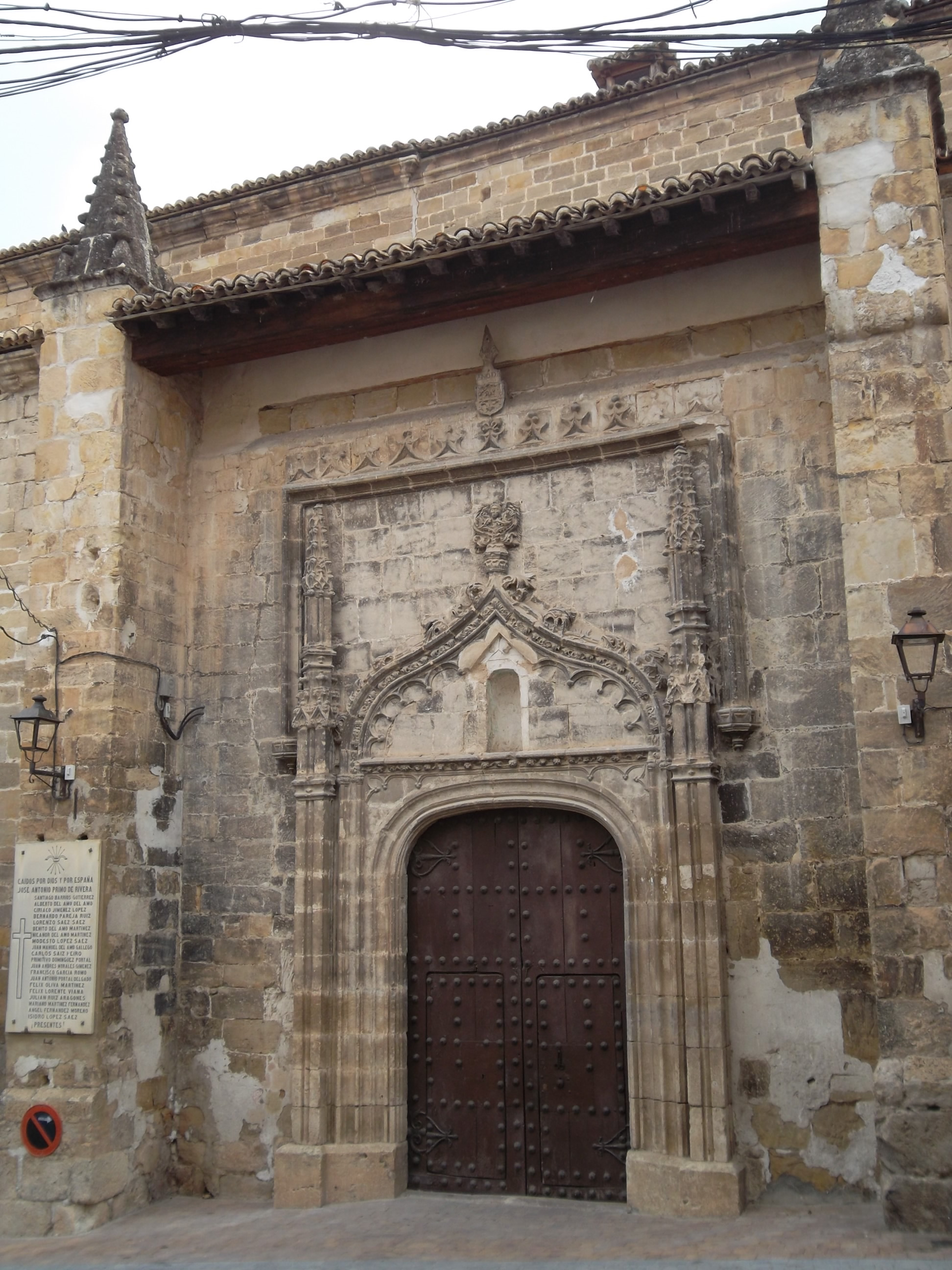 Auñón-Iglesia parroquial dedicada a San Juan Bautista, primera mitad del siglo XVI. La portada de acceso al templo, es un ejemplar de gótico tardío, con arco semicircular con finas pilastras góticas y tejaroz bajo en el que se ve el escudo de la Orden de Calatrava.